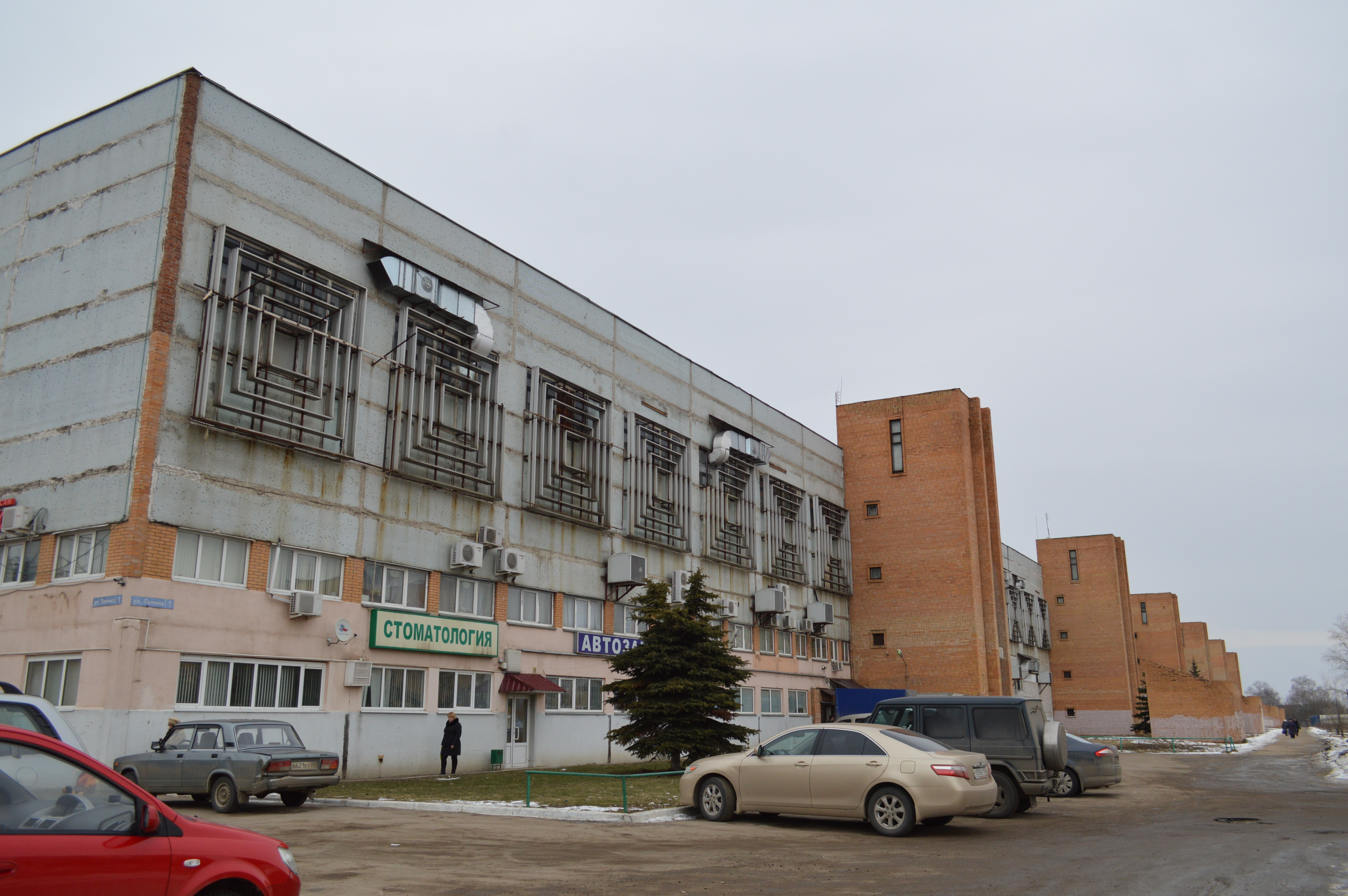 Завод.